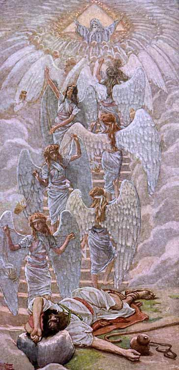 Jacob's ladder